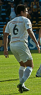 Partido del 18 de marzo de 2013, Rosario Central 2-Olimpo 2; Franco Peppino de Rosario Central.